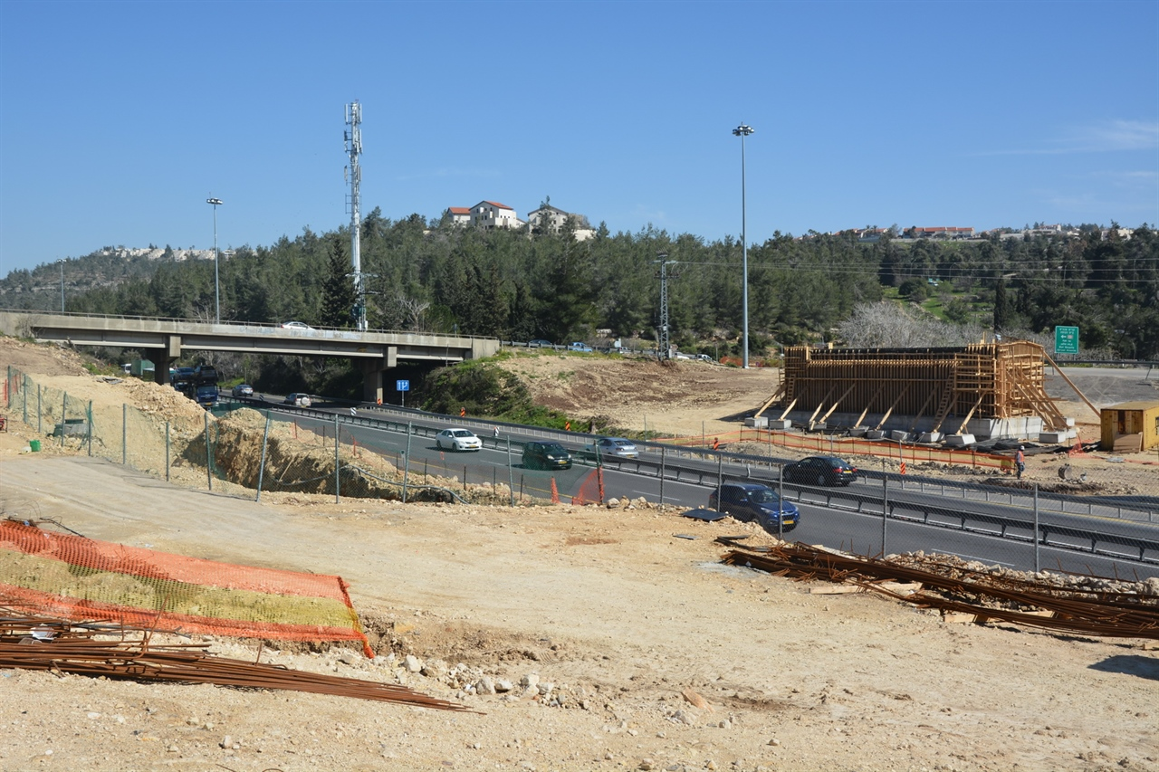 מחלף חמד. גשר חדש מוקם סמוך לגשר המחלף הקיים. הגשר הקיים ייהרס בעבודות לילה ע"י באגרים. לגשר החדש ארבעה ניצבים. שני ניצבי האמצע במצב של חפירת תעלות היסודות, ניצבי הקצה בהקמה. לאחר הקמת הגשר החדש יוקמו מעגלי שני מעגלי תנועה; אחד בכל צד של הגשר. הכנת מעגלי התנועה תיארך זמן קצר בלבד.